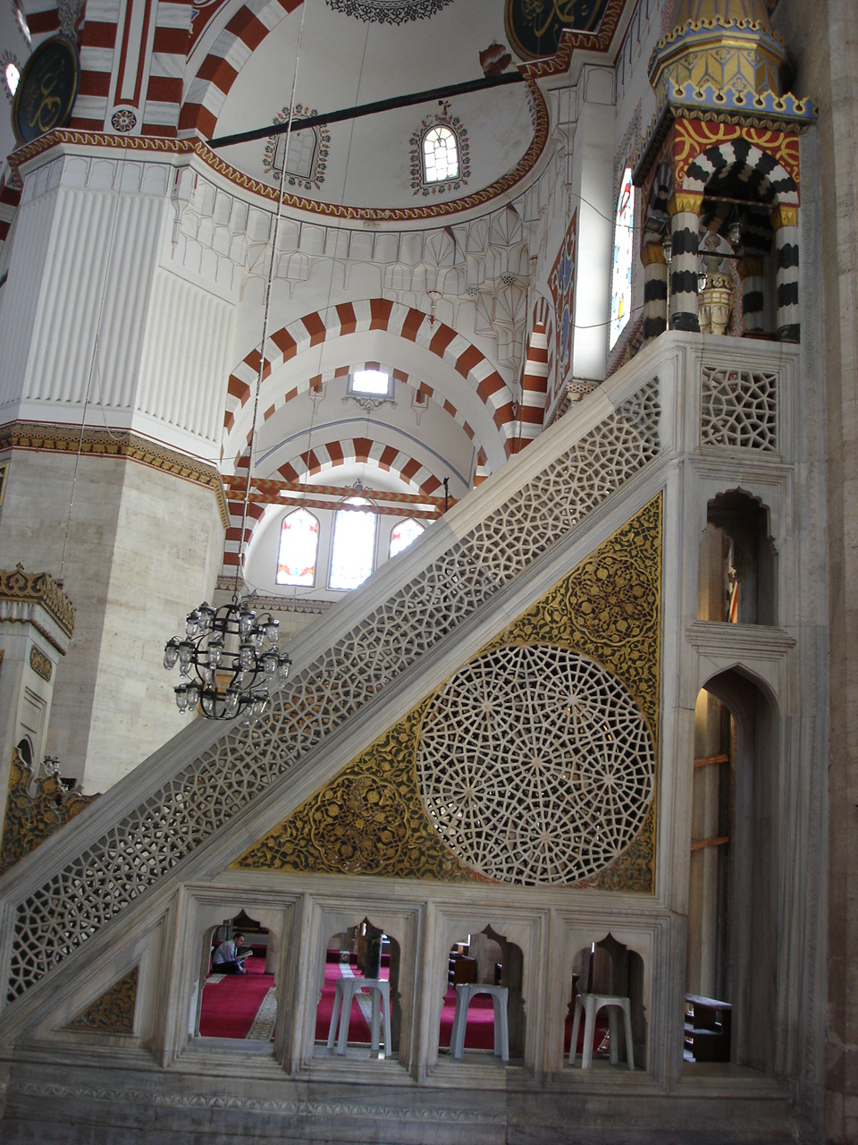 Pulpito (minbar) della Moschea detta Sehzade camii ad Istanbul. Foto di: Giovanni Dall'Orto, 29-5-2006.